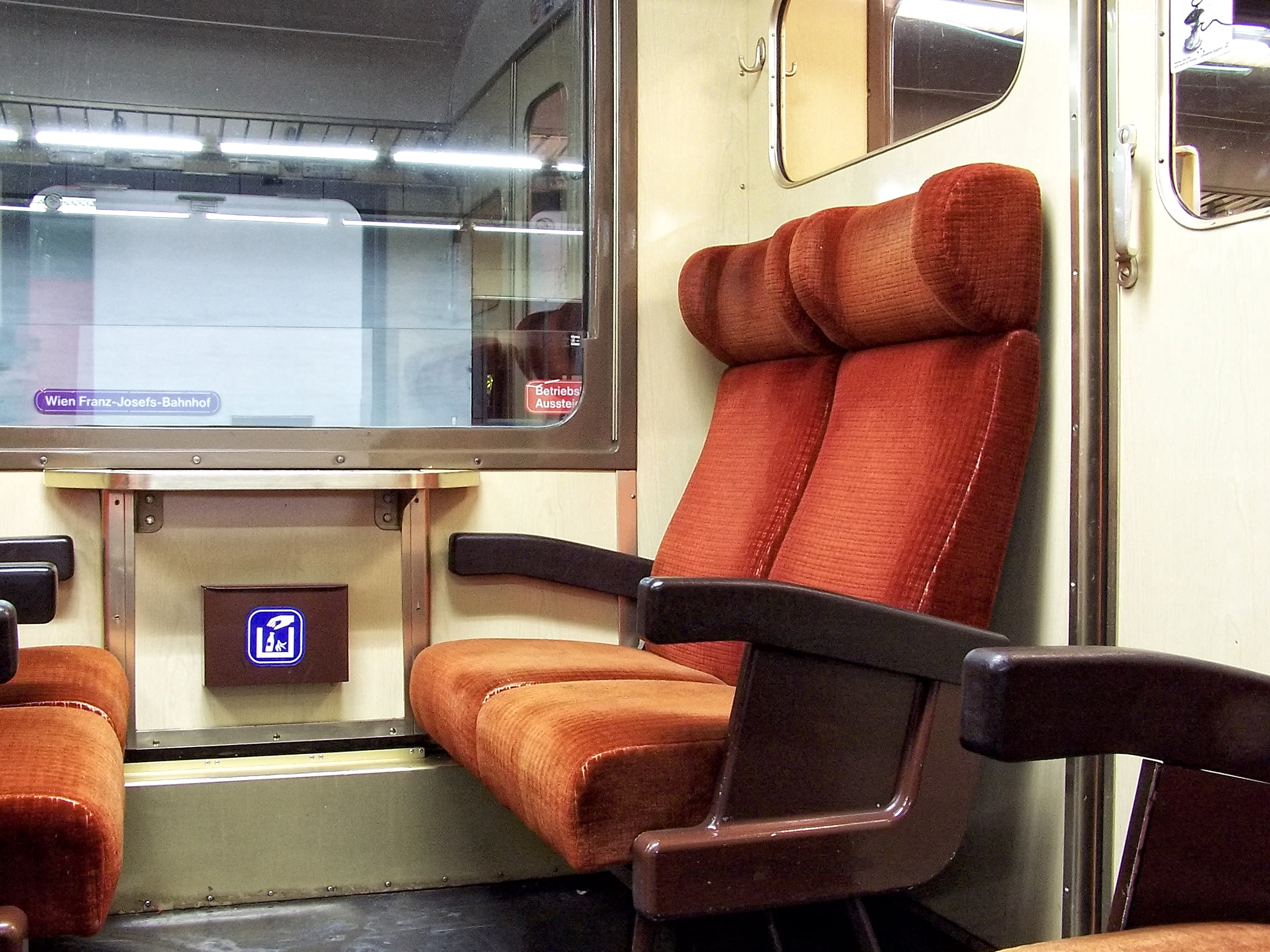 Flugzeugsitze eines Schlierenwagens der letzten Bauserien